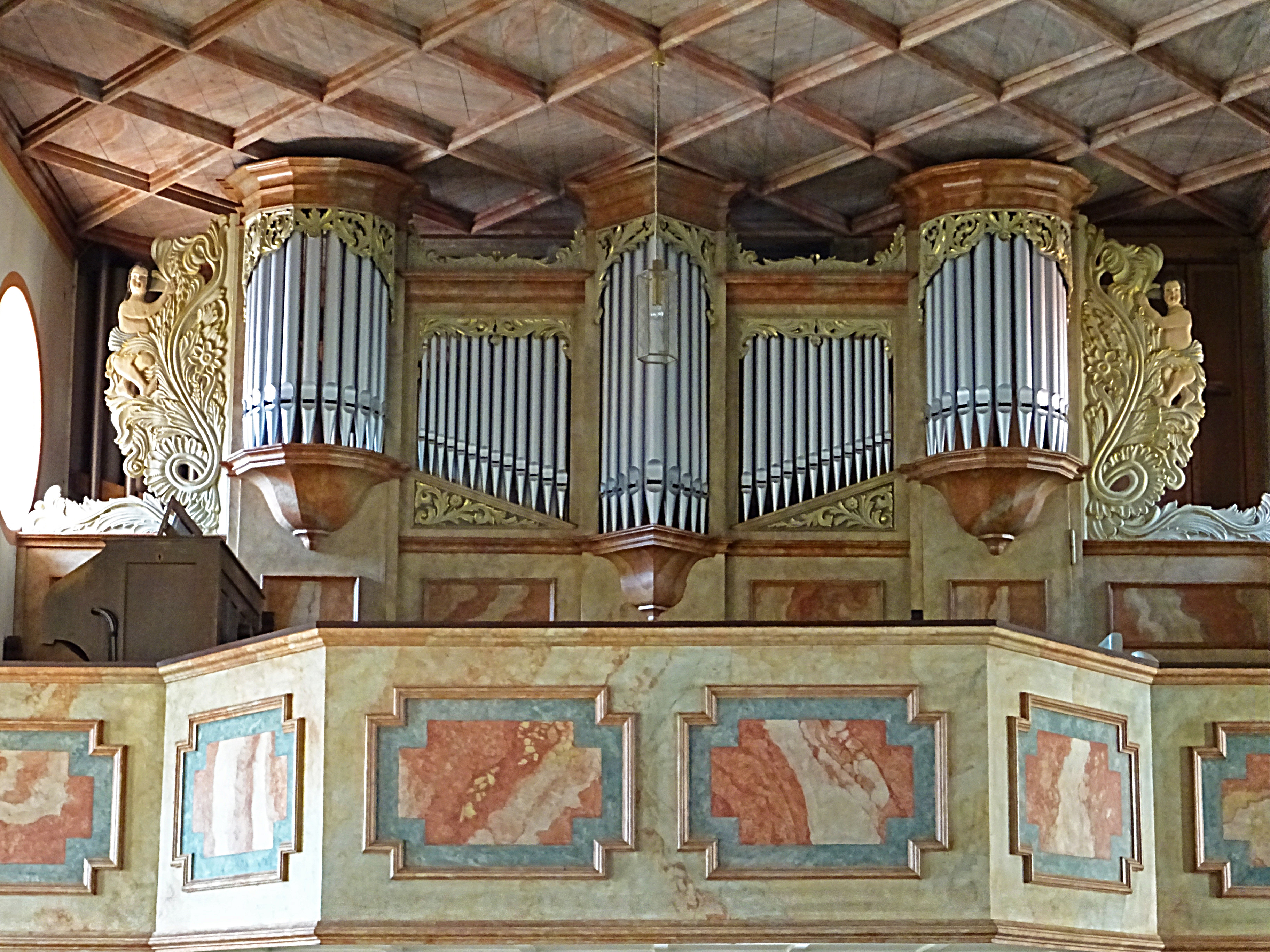 Die Orgel in der Dorfkirche St. Martin in Mackenrode (Eichsfeld) wurde von den Gebrüdern Krell 1938/39 erbaut (IIP/15)[1]